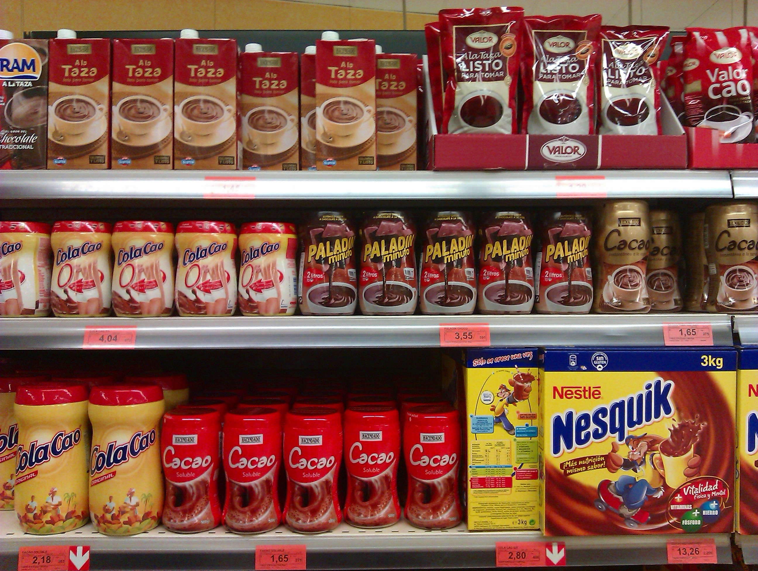 Diversos productos de cacao y chocolate en polvo, de distintas marcas comerciales, en un supermercado Mercadona en España.